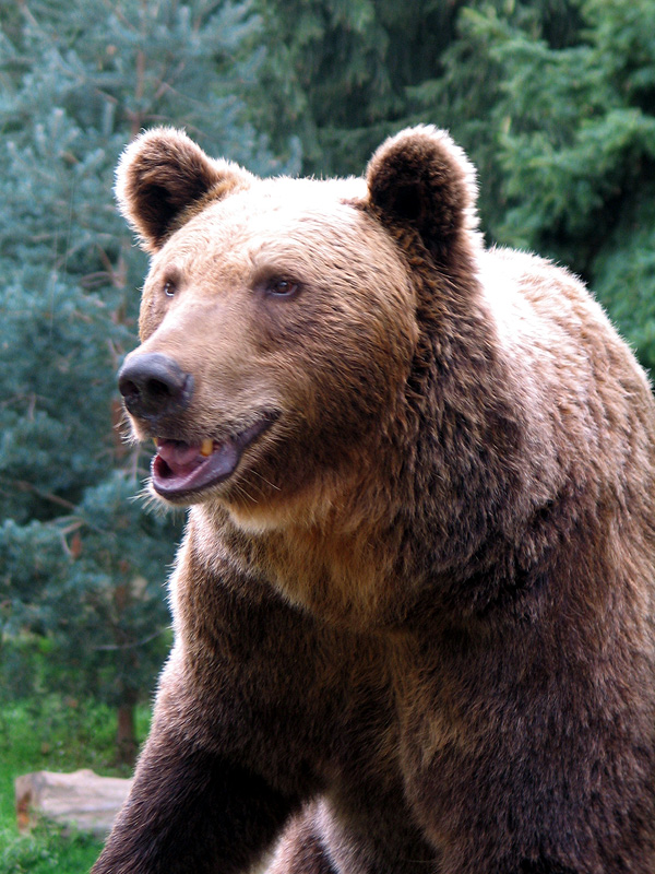 a bear, from the "Parc animalier des Pyrénées"